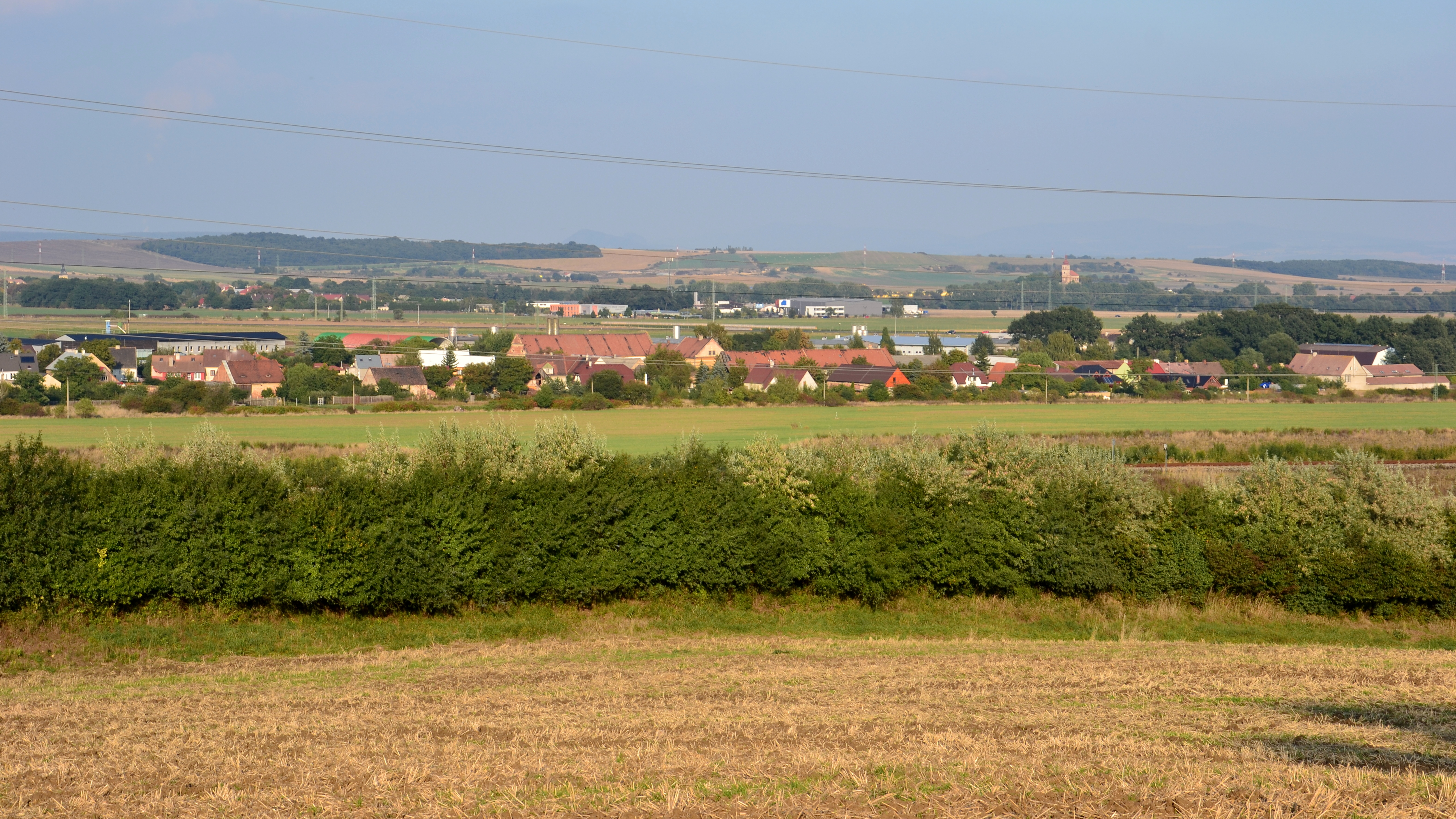 Východní část vesnice z jihu